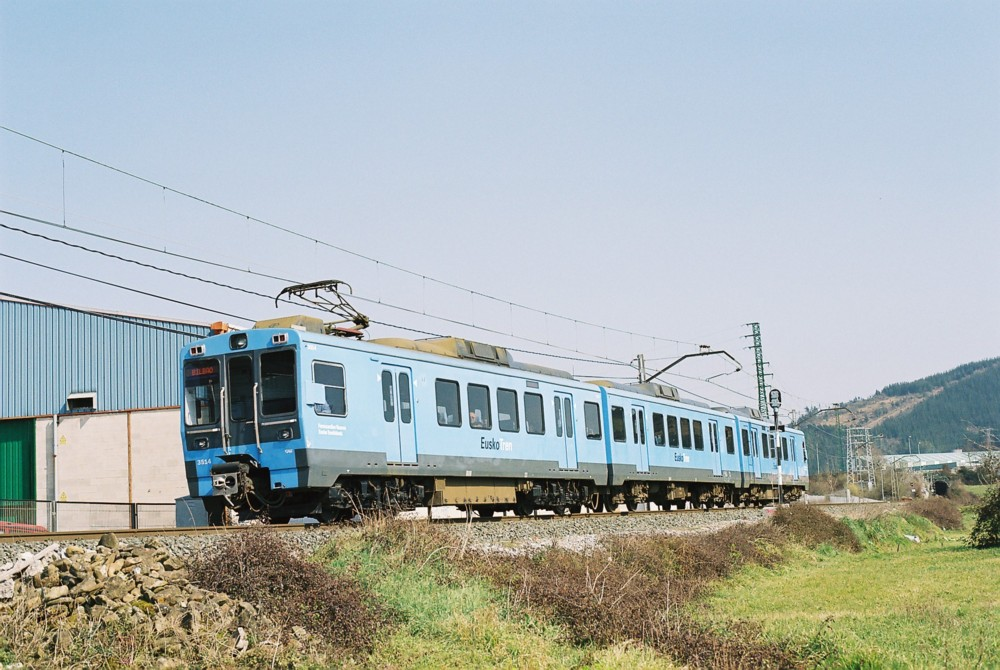 UT-3514 de Euskotren en Traña-Abadiño